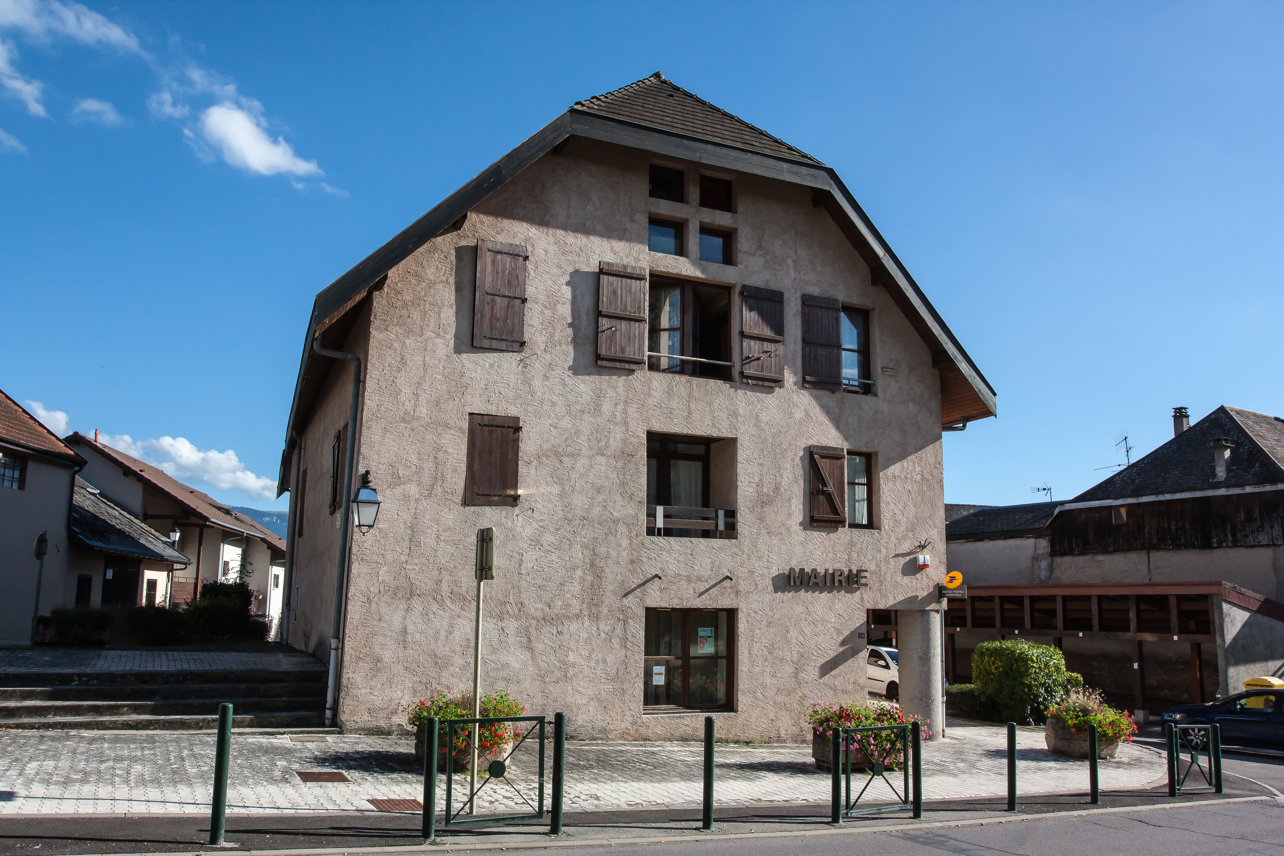 Hotel de ville de Lovagny / Lovagny / Haute-Savoie / France